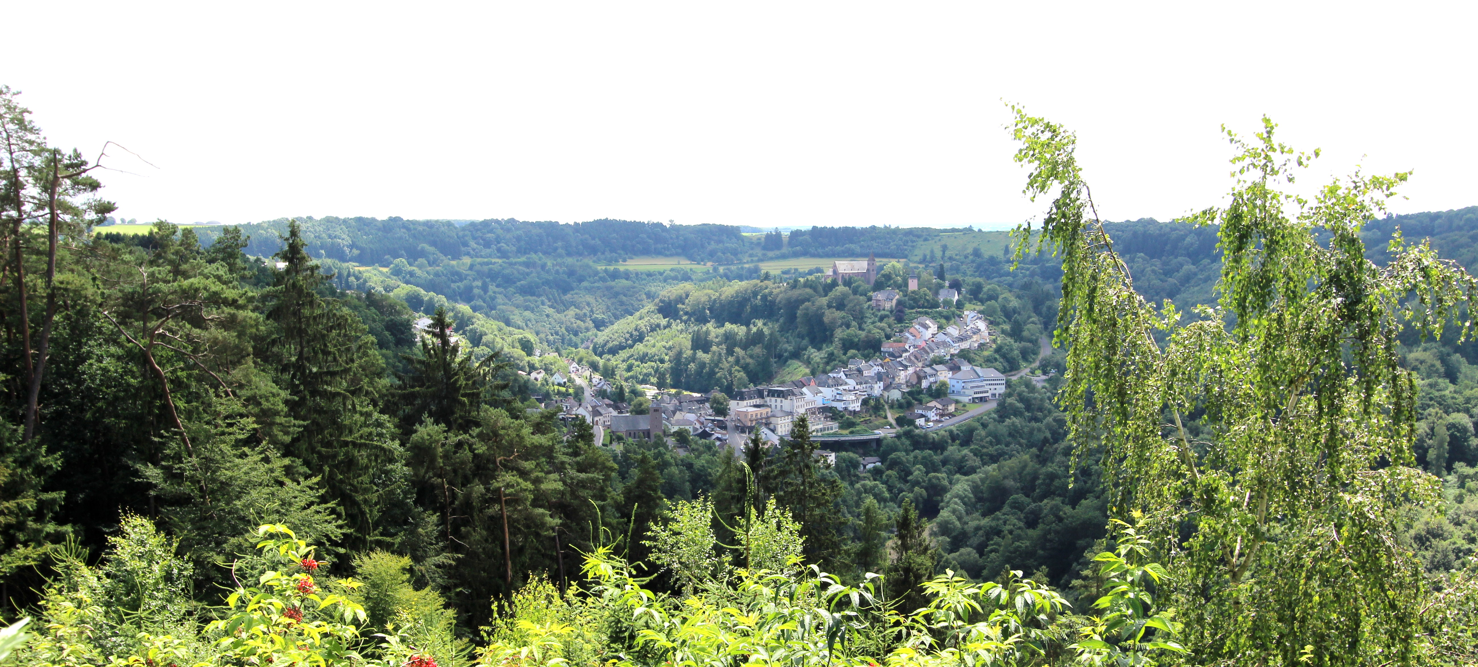 Panoramablick über Kyllburg in der Eifel. Aufnahme von 2016.